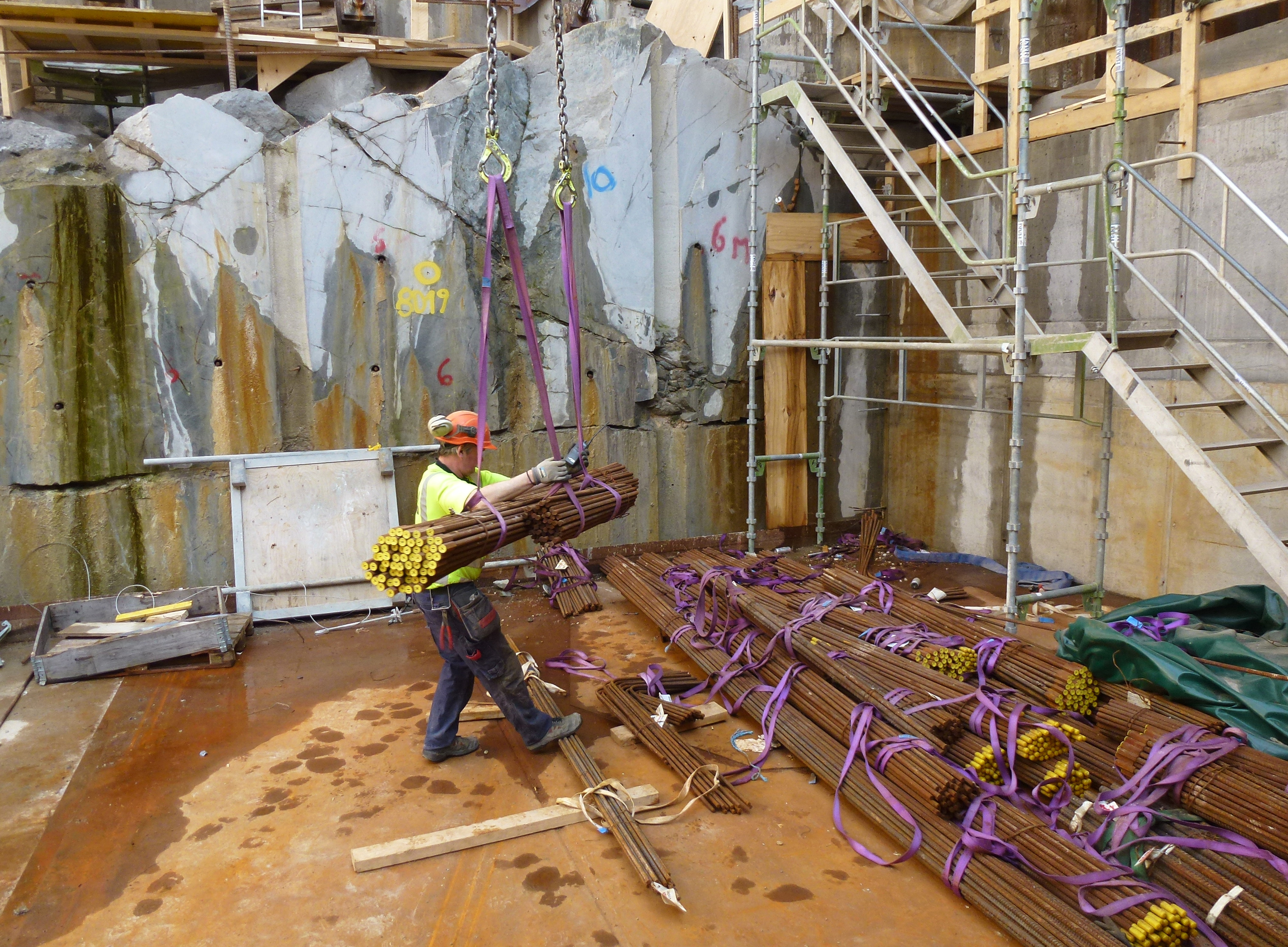 Citybanan Sänktunnel april 2013: armering, huvudtunnel Riddarholmssidan